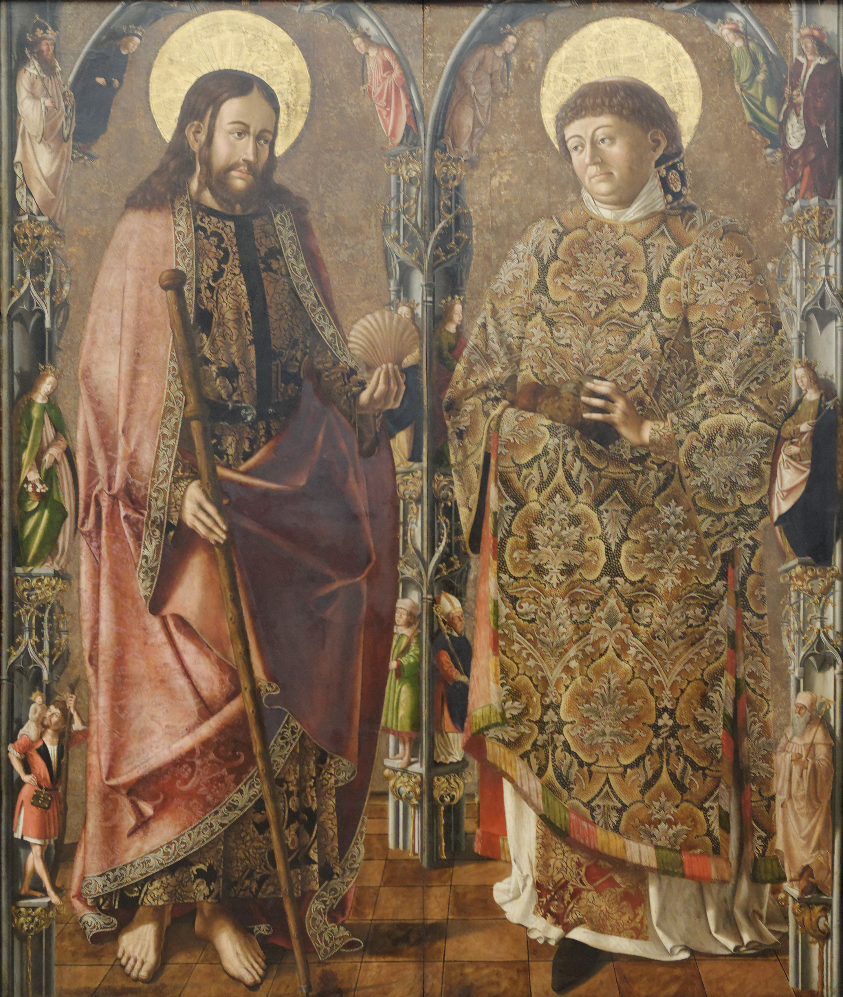 Saint Jacques et Saint Etienne, Marx Reichlich. Alte Pinakothek, Munich